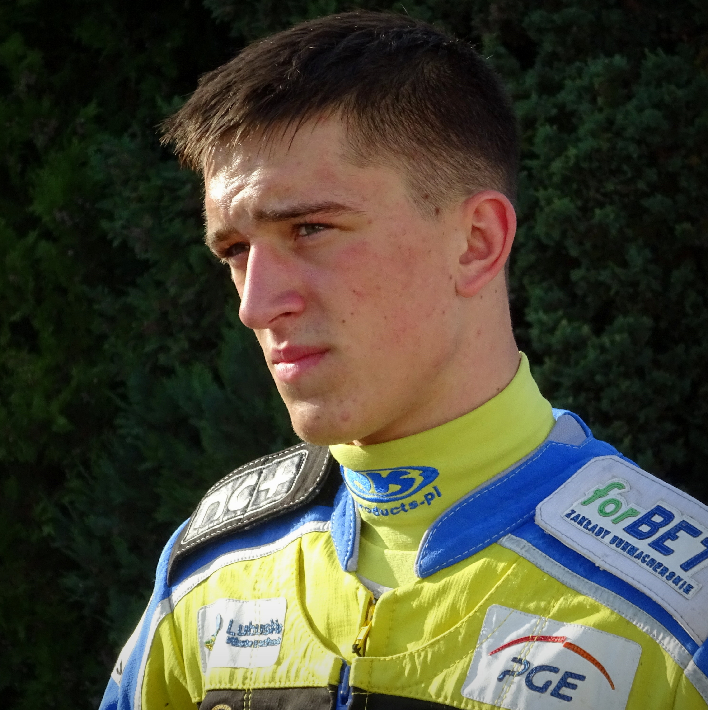 Hubert Czerniawski, wychowanek Stali Gorzów.